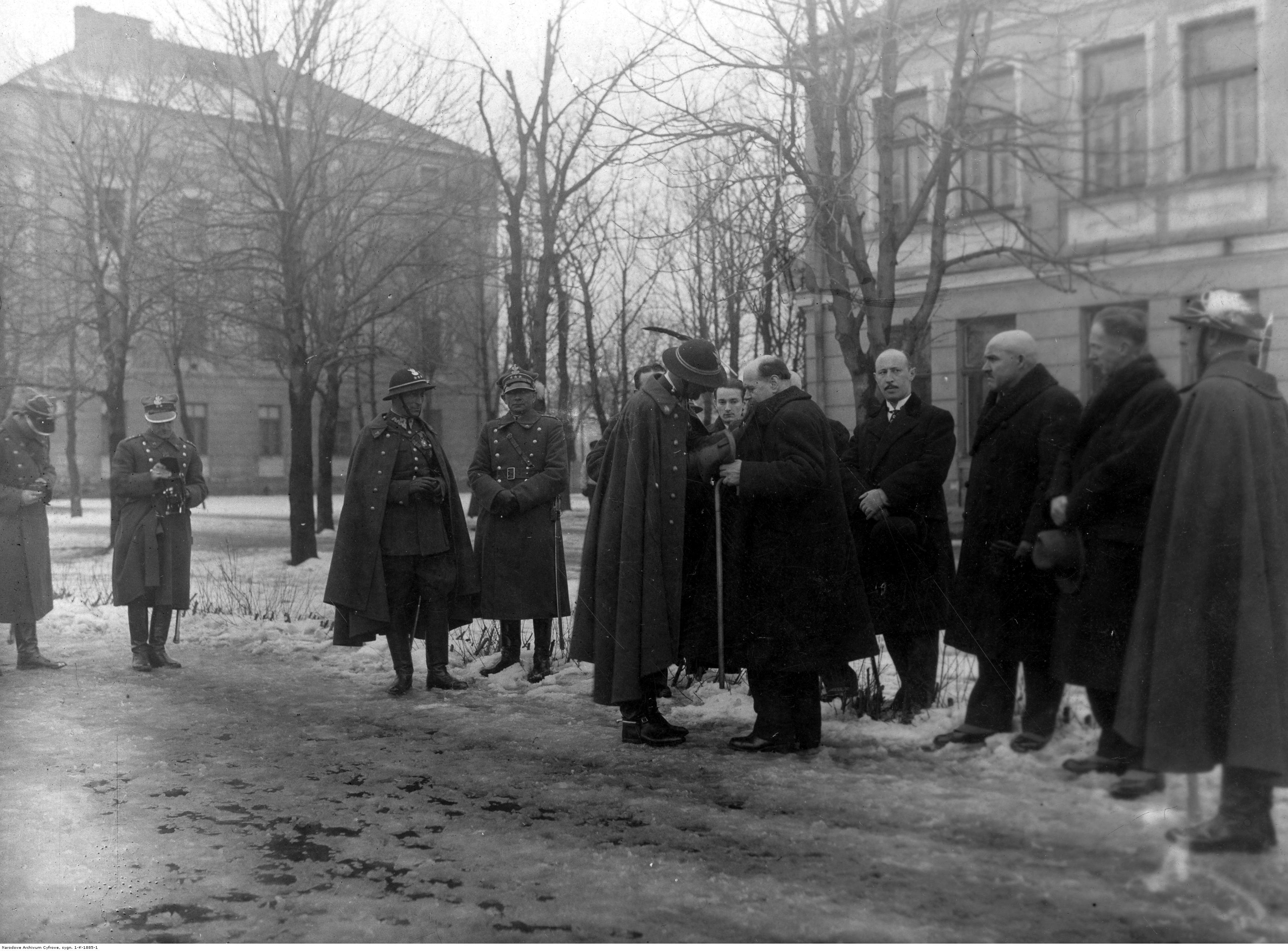 Wręczenie Kazimierzowi Przerwie-Tetmajerowi honorowej odznaki 1 Pułku Strzelców Podhalańskich w Nowym Sączu. Koncern Ilustrowany Kurier Codzienny - Archiwum Ilustracji. Sygnatura: 1-K-1885-1